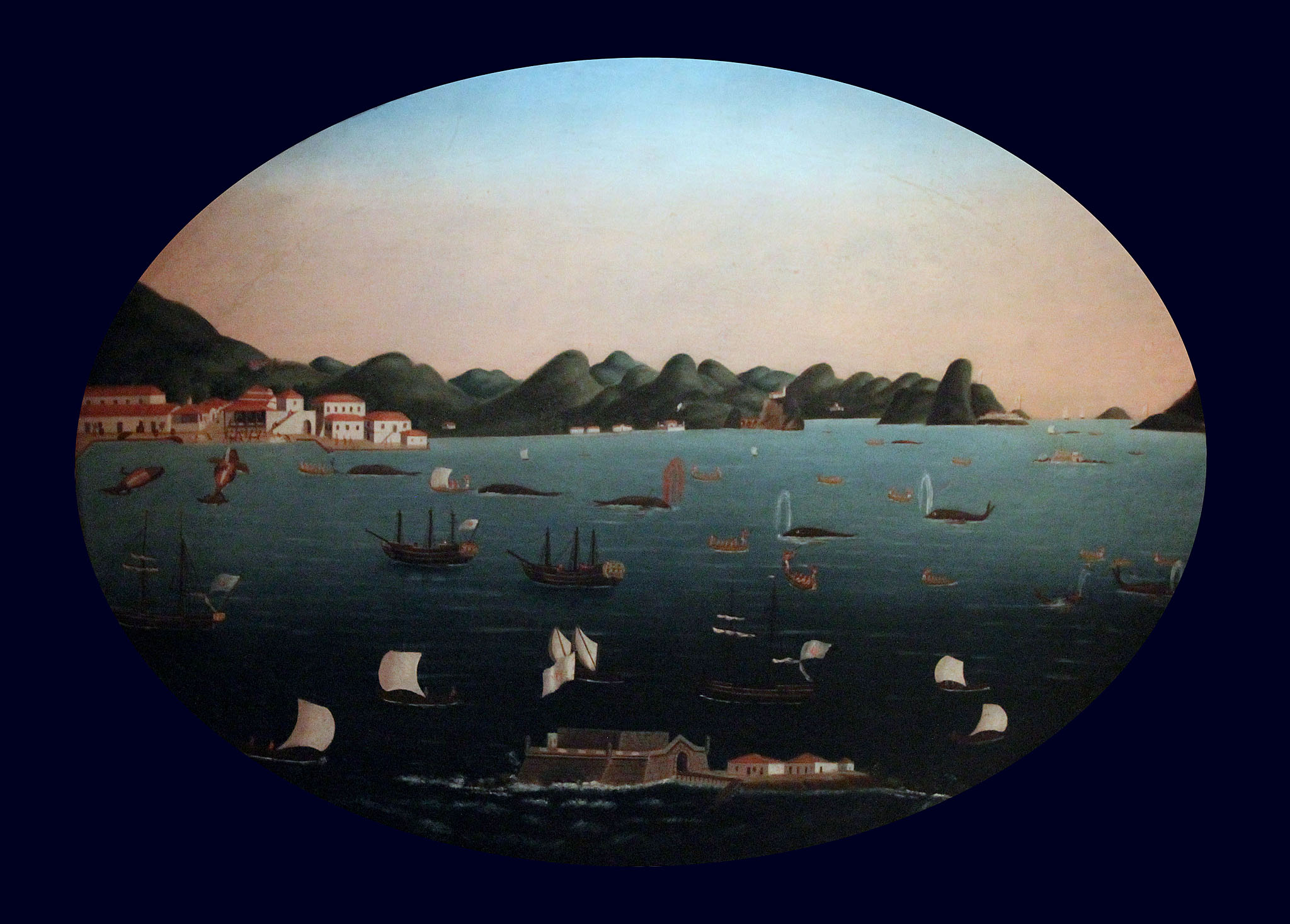 Óleo sobre tela, 92 x 126 cm (oval) sem assinatura e sem data. Coleção do Museu Histórico Nacional, Rio de Janeiro. Única cena conhecida da pesca da baleia na Baía de Guanabara. Ao fundo, Ponta da Armação, onde ficava a fábrica de extração de óleo da baleia..